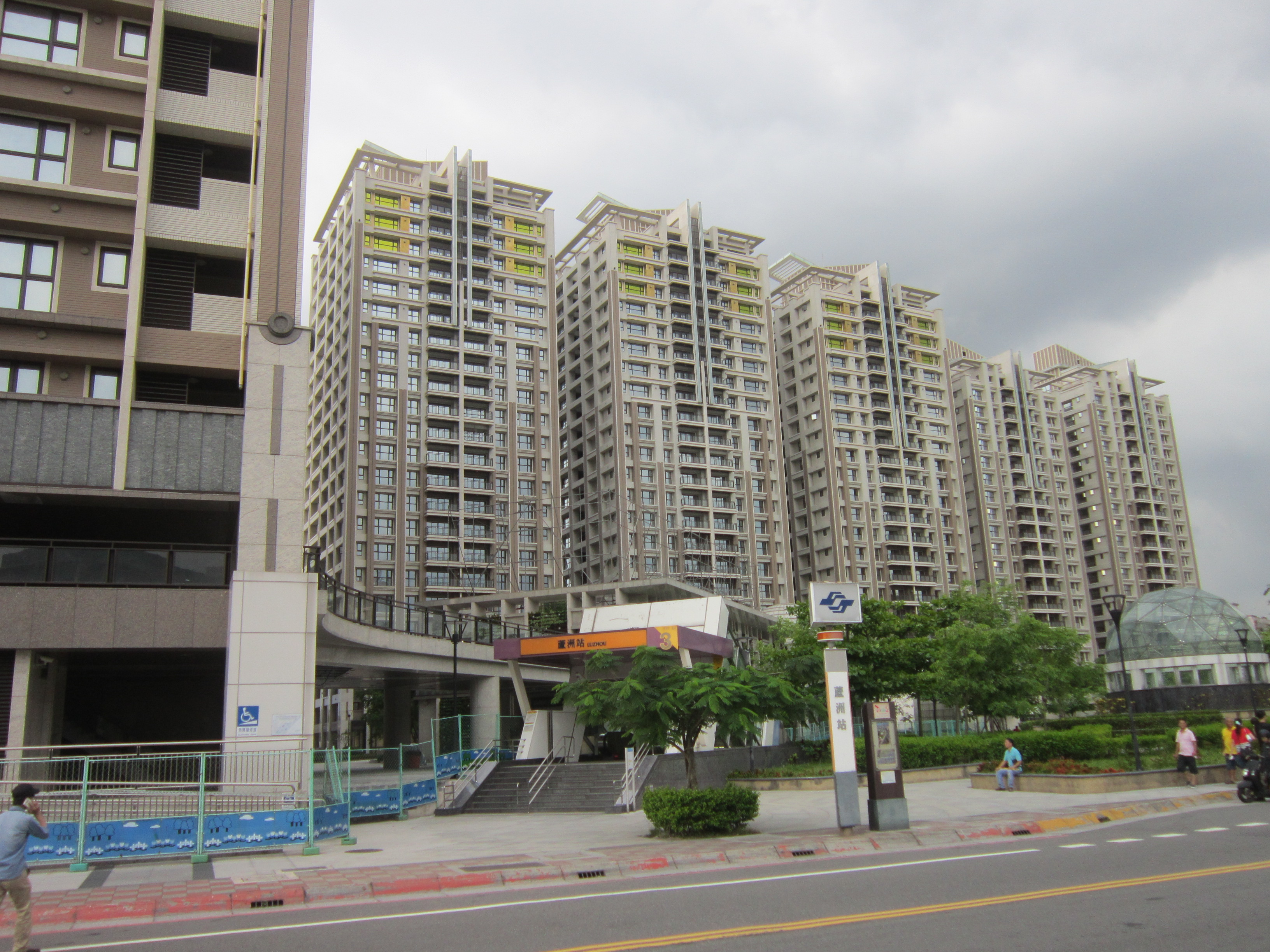 蘆洲站3號出入口及已完工的捷運共構宅(2016年6月)